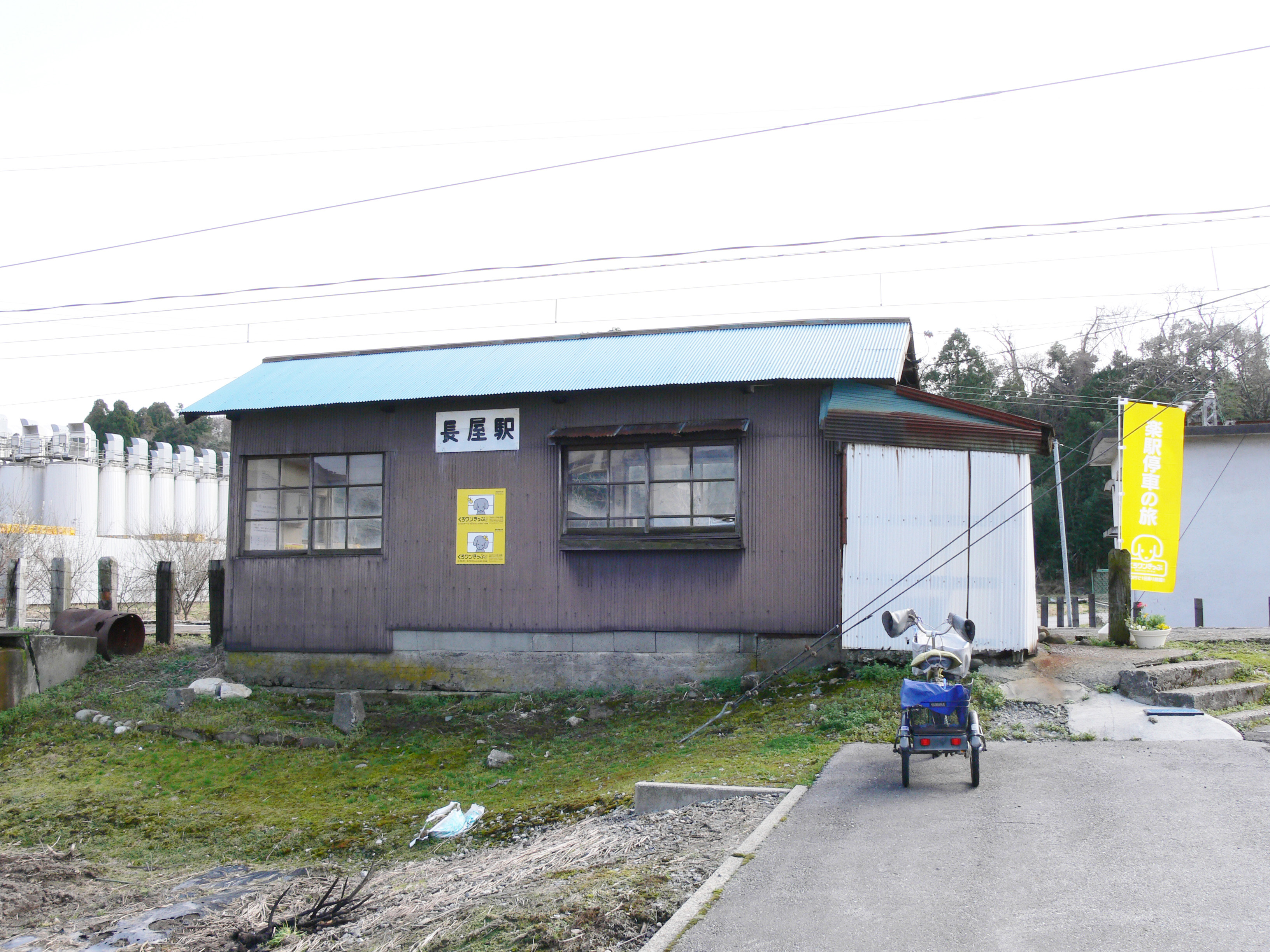 長屋駅